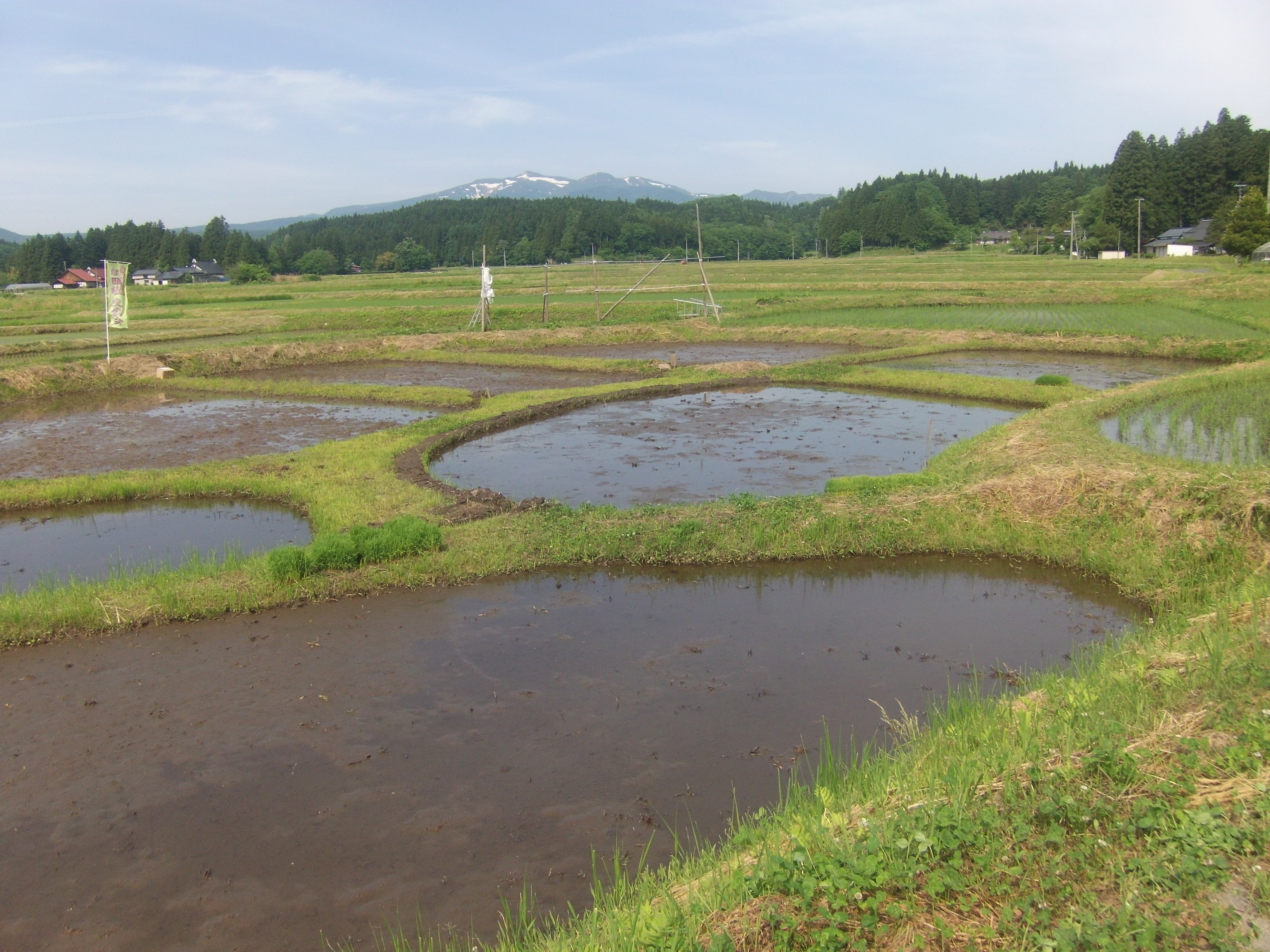 旧骨寺村荘園の田園風景、不整形の畦は中世から変わらない